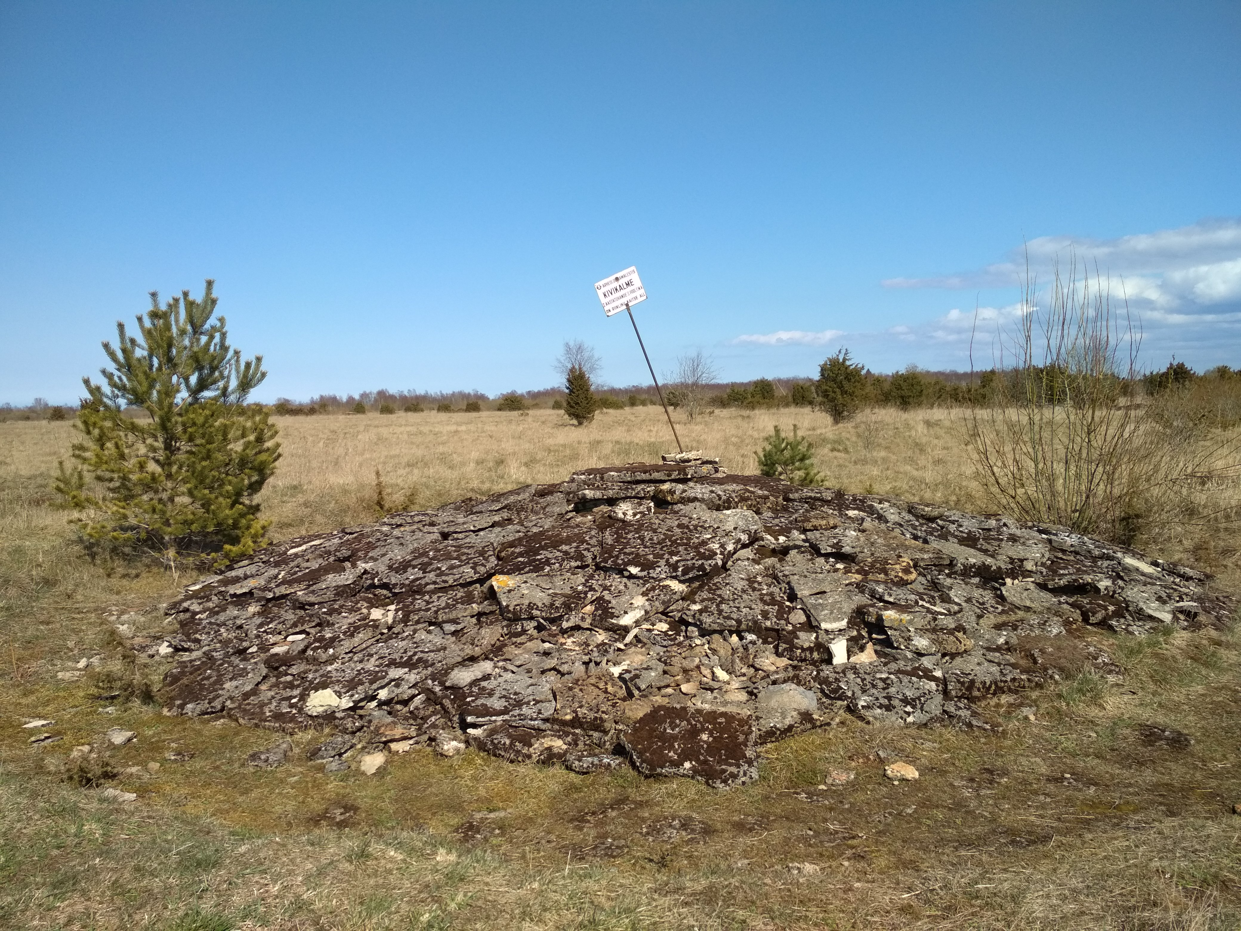 Üks kivikalme Rebala küla kivikirstkalmete rühmast nimega "Lastekangrud"